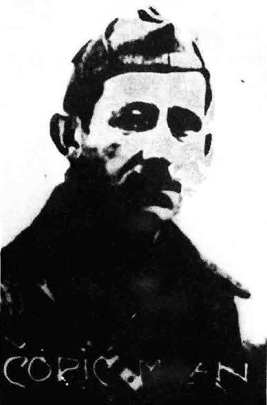 Srpskohrvatski / српскохрватски: Milan Ćopić kao oficir Španske republikanske vojske 1937.